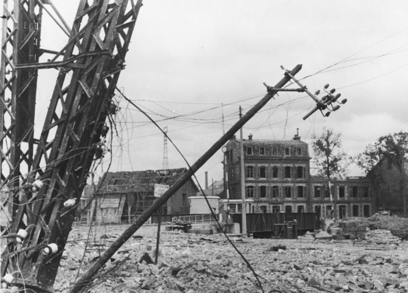 Invasionsfront Das von anglo-amerikanischen Bomben und Schiffsartillerie zerstörte Hafengebiet von Caen in der Normandie. Foto: SS-Kriegsberichter Stollberg Information added by Wikimedia users.